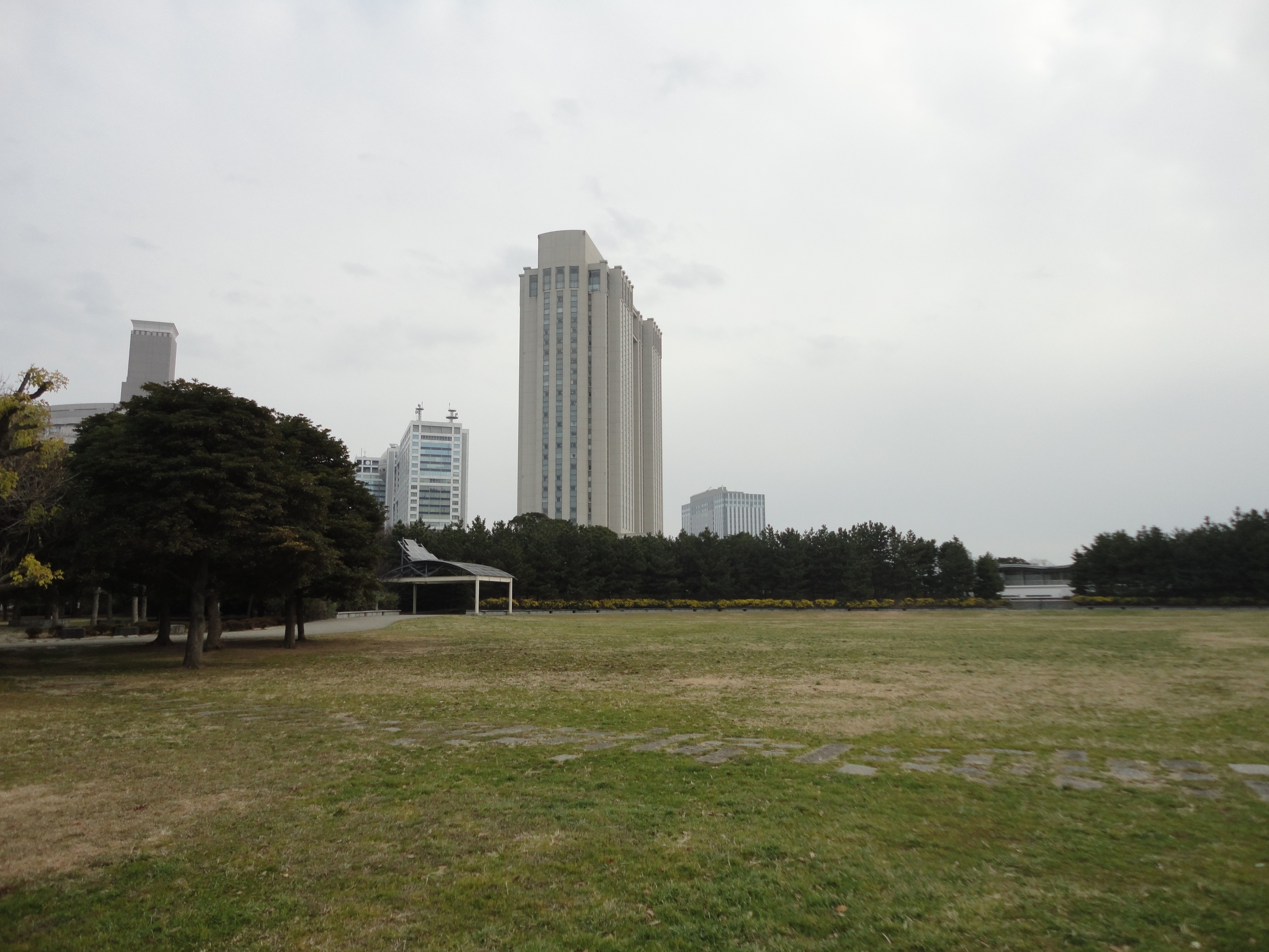 台場